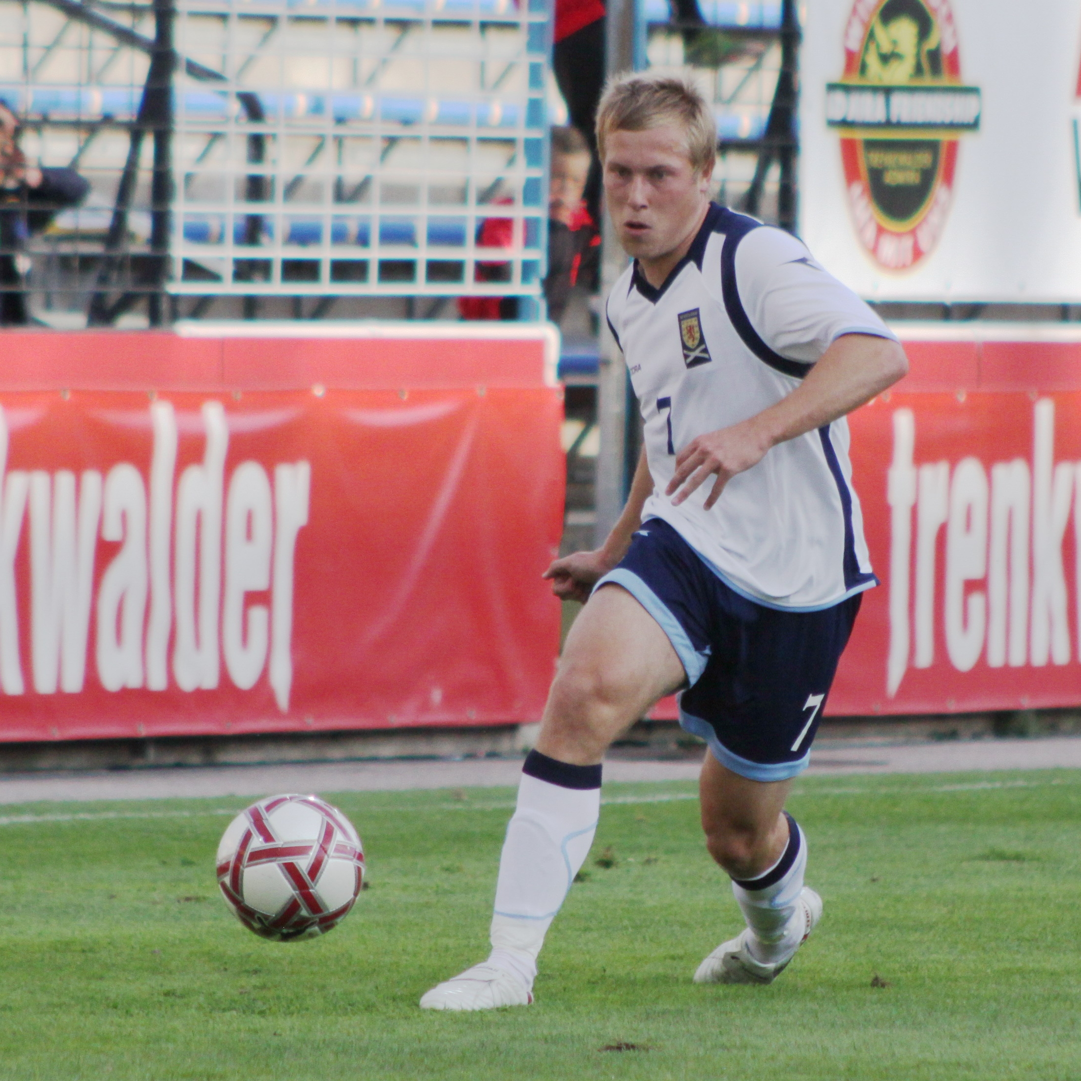 Scott Arfield (FC Falkirk) - Schottische Fußballnationalmannschaft (U-21-Männer) Scott Arfield (Falkirk F.C.) - Scotland national under-21 football team — (3)